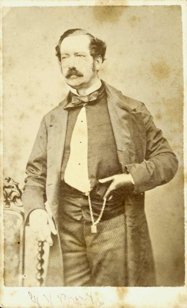 Gustavus Vaughan Brooke